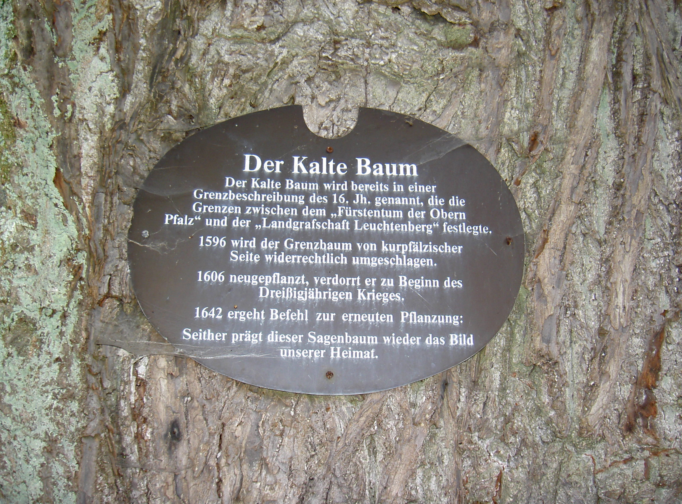 Kaltenbaum